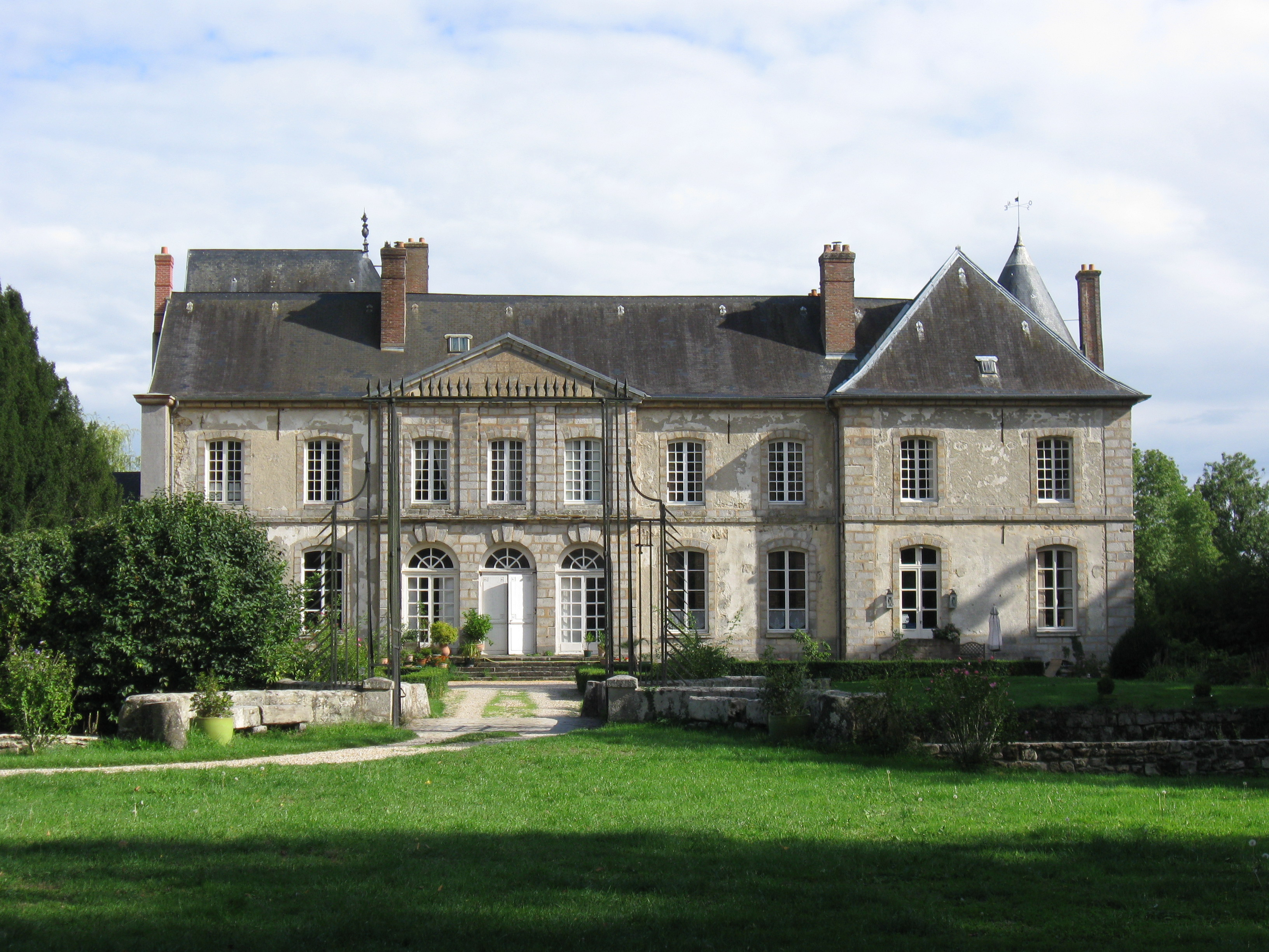 Château de Courtry (façade nord-ouest). (Sivry-Courtry, Seine-et-Marne, région Île-de-France).